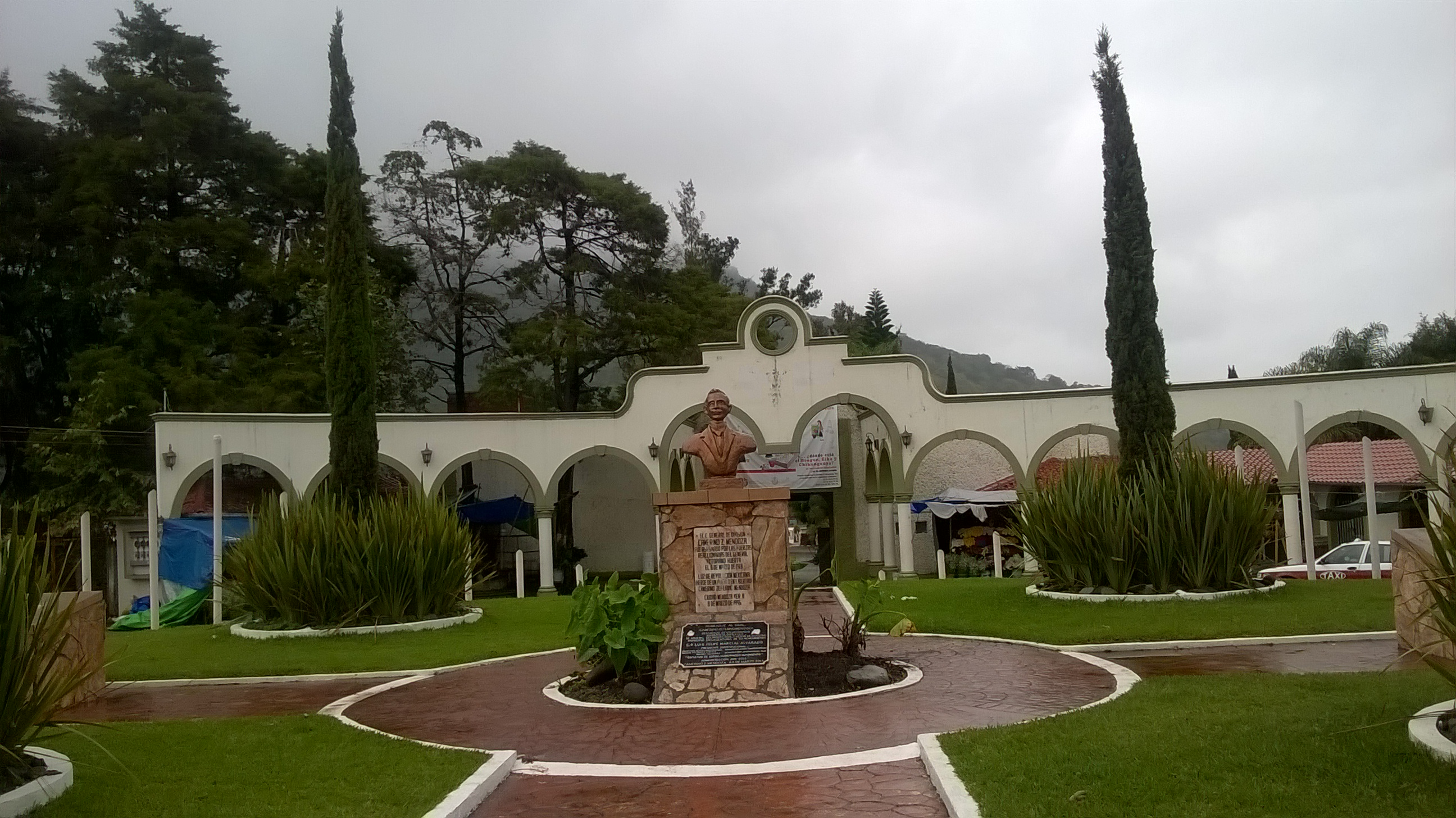 Fachada del cementerio de Ciudad Mendoza en Veracruz, México